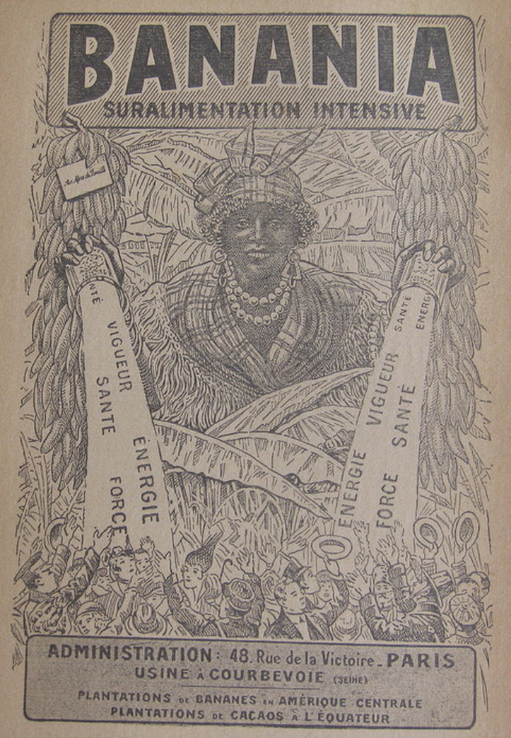 Publicité générique de la marque Banania, L'Antillaise, publiée dans différentes journaux à partir de 1915.